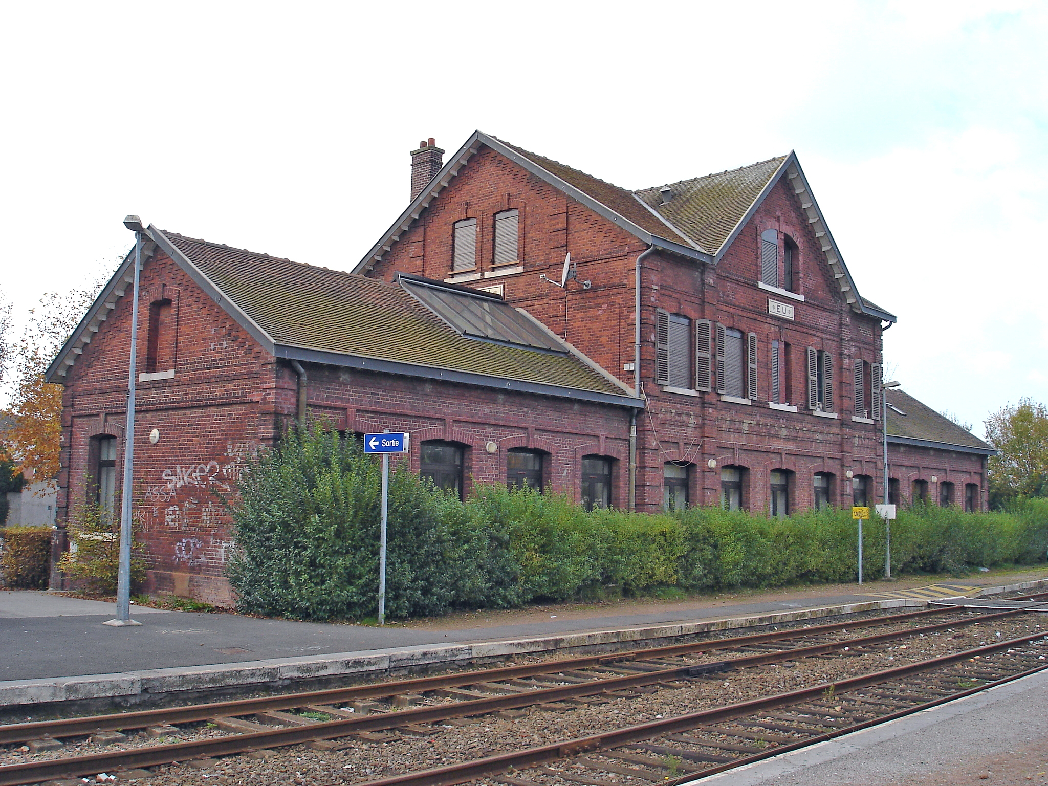 Gare d'Eu (autrefois Eu-la Chaussée).